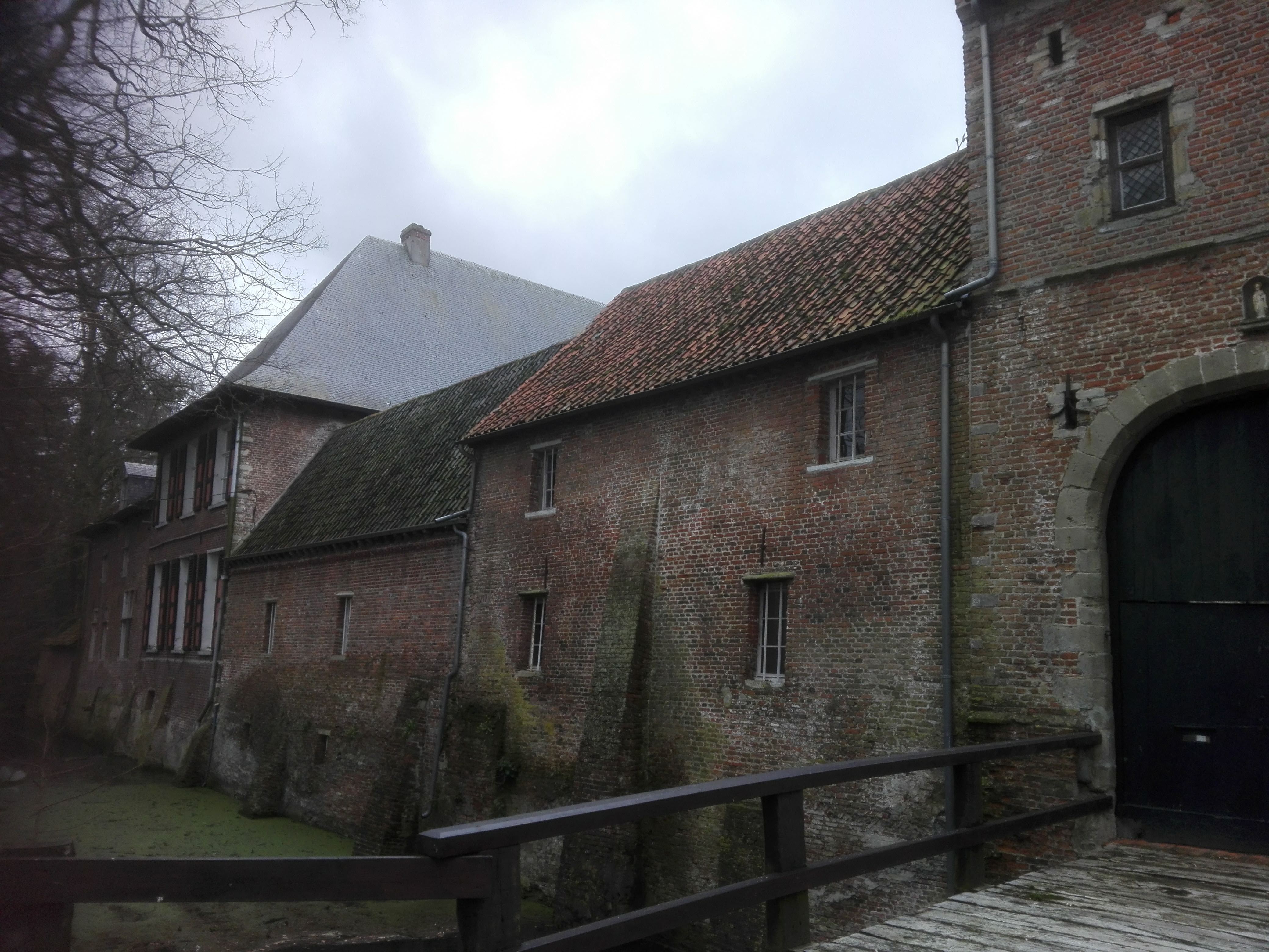 Kasteel van Tielen noordaanzicht